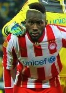 Arthur Masuaku